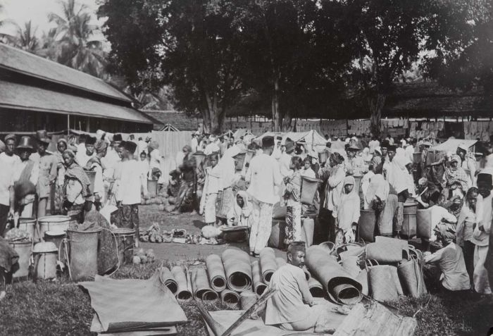 foto. Gezicht over de markt in Barabai